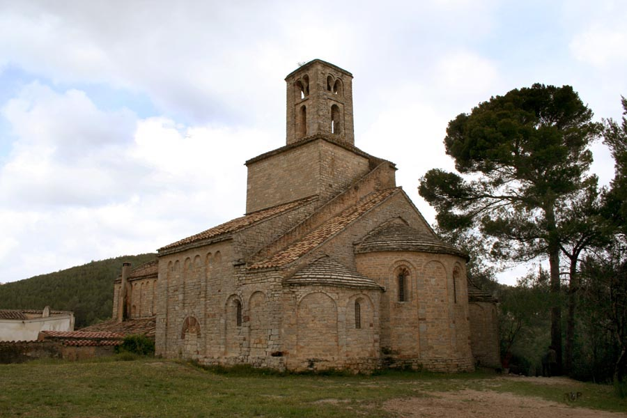 Monasterio benedictino de Sant Ponç; territorialmente pertenece a Cervello pero eclesiasticamente pertenece a Corbera